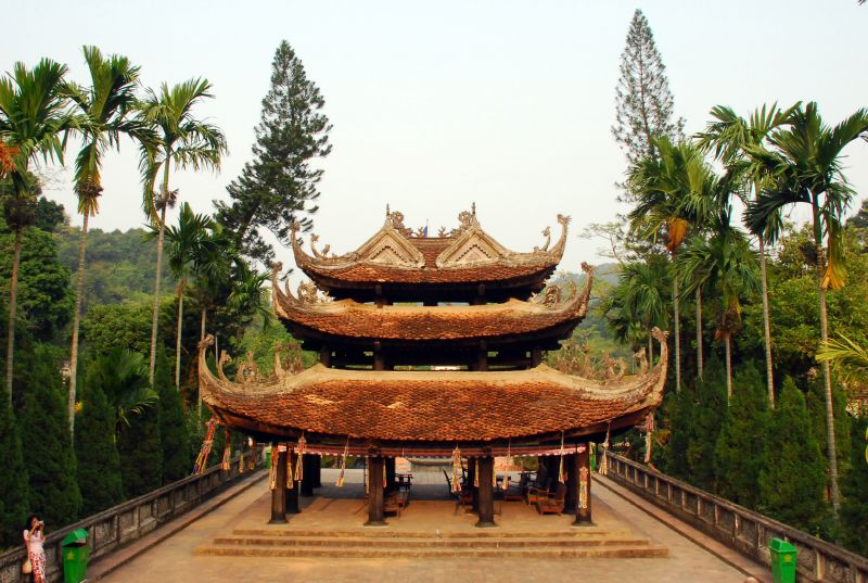 Perfume Pagoda, Hatay, Vietnam.